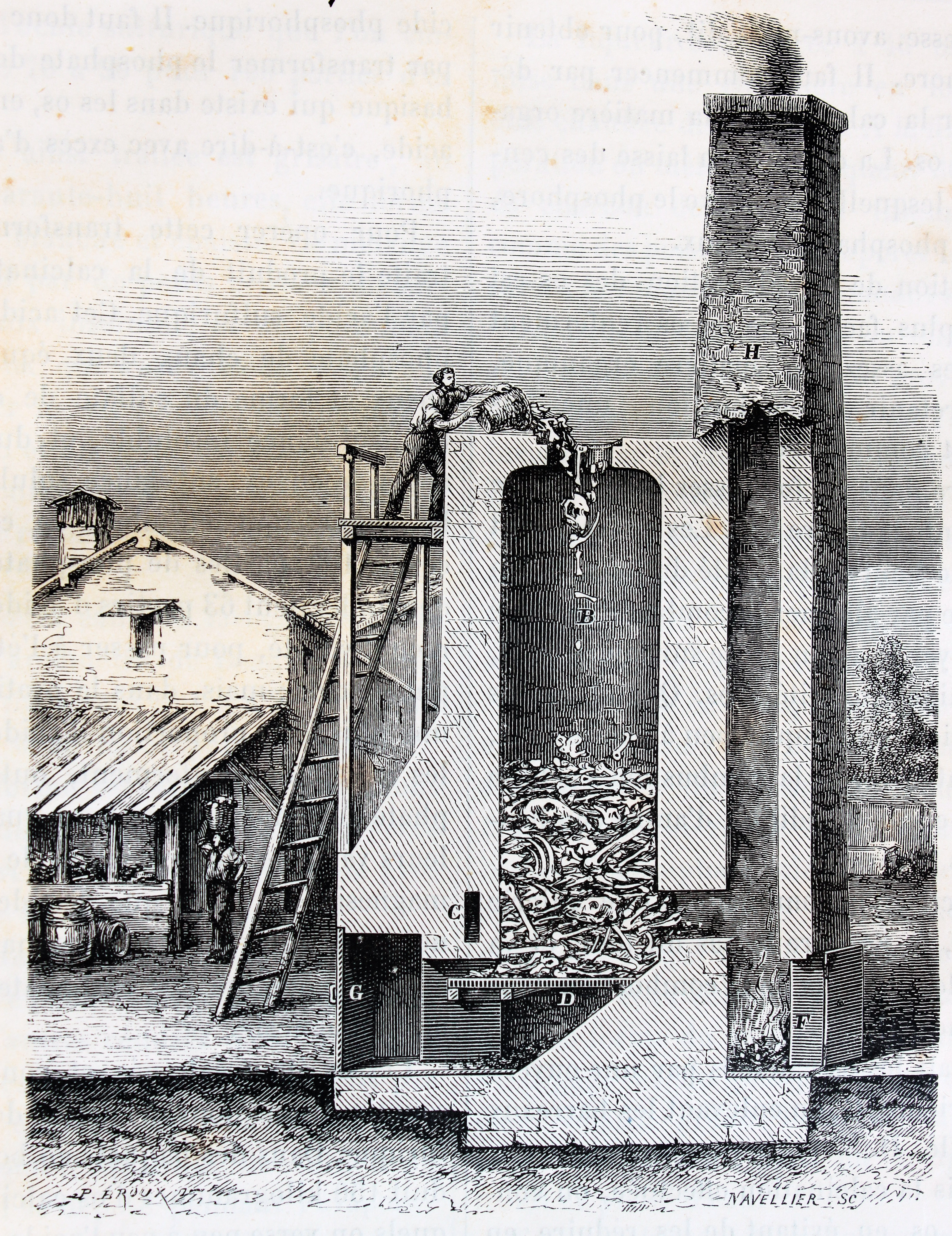 Ilustraciones de la obra : Les merveilles de l'industrie ou, Description des principales industries modernes / par Louis Figuier. - Paris : Furne, Jouvet, [1873-1877]. - Tome III